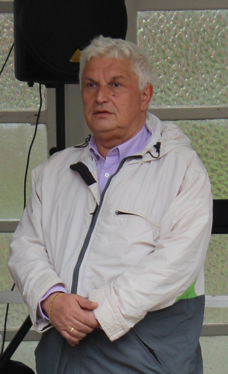 Český podnikatel Alexandr Seidl.